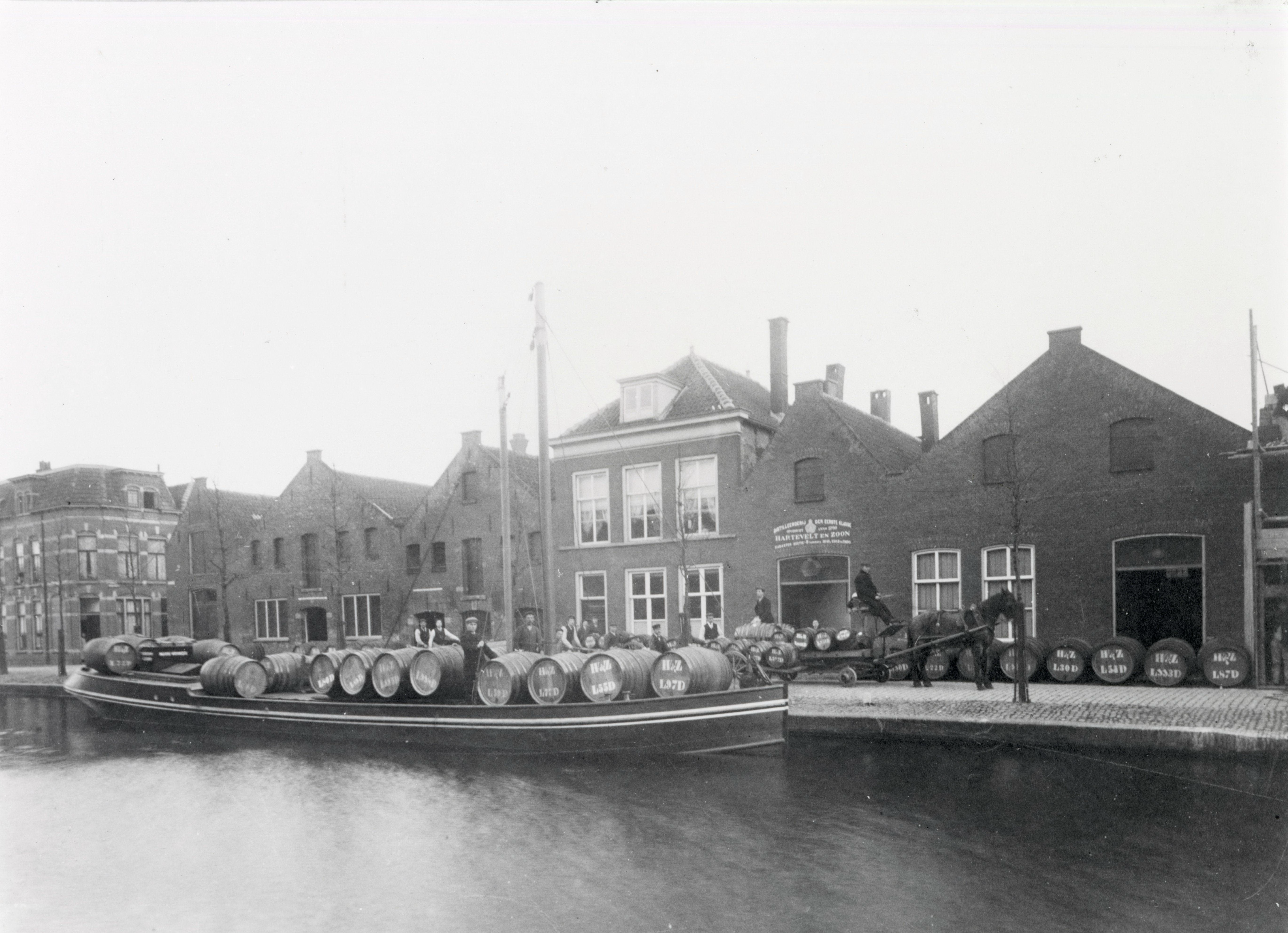 Distilleerderij "De Franse Kroon" van Hartevelt & Zoon, gezien vanaf de noordzijde van de Langegracht naar het zuidoosten. Voor de wal een motorvrachtschip met vaten. Fotoreproductie van het origineel uit het jubileumalbum, 1760-1910.